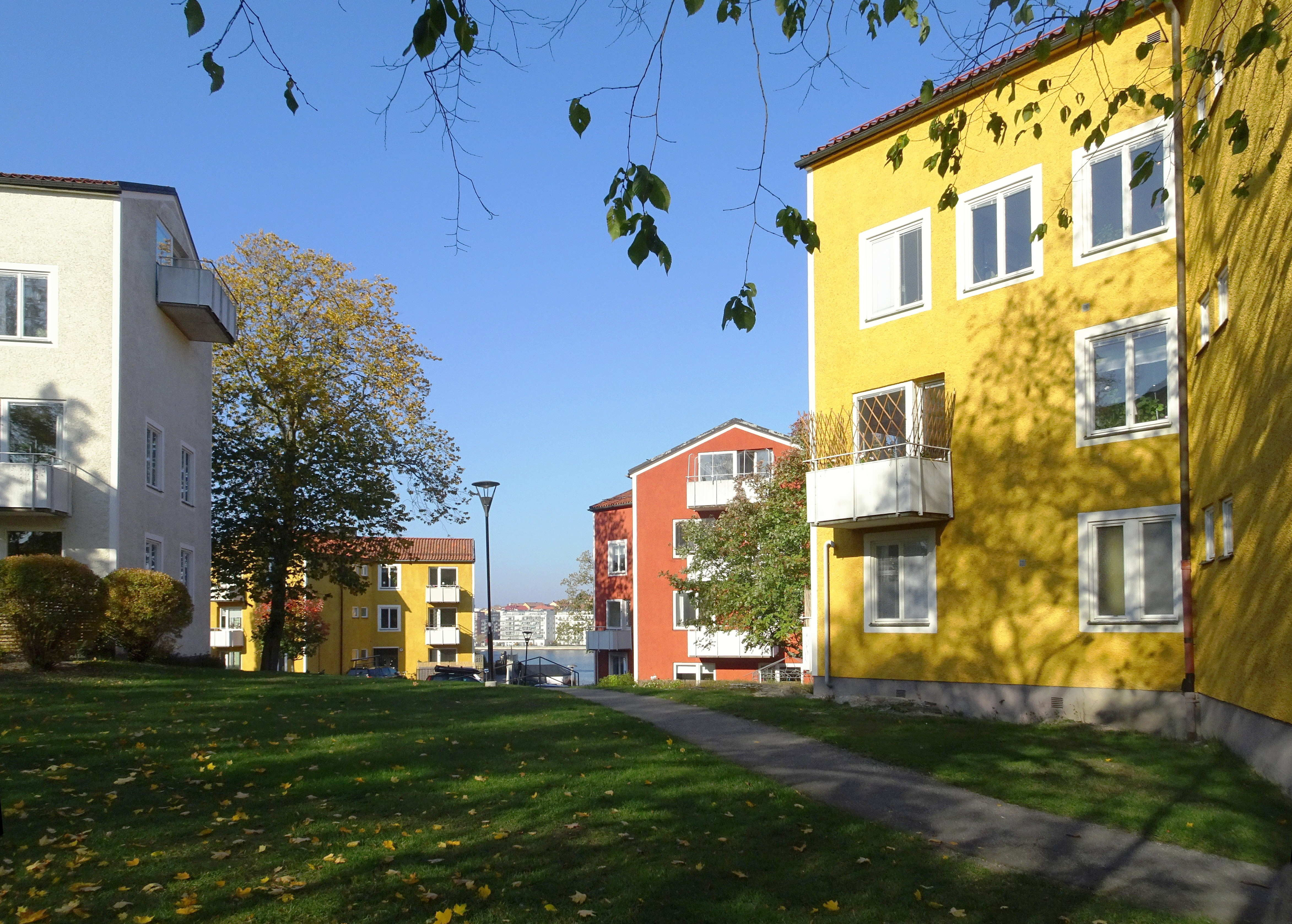 Gröndals stjärnhus, arkitekt Backström & Reinius